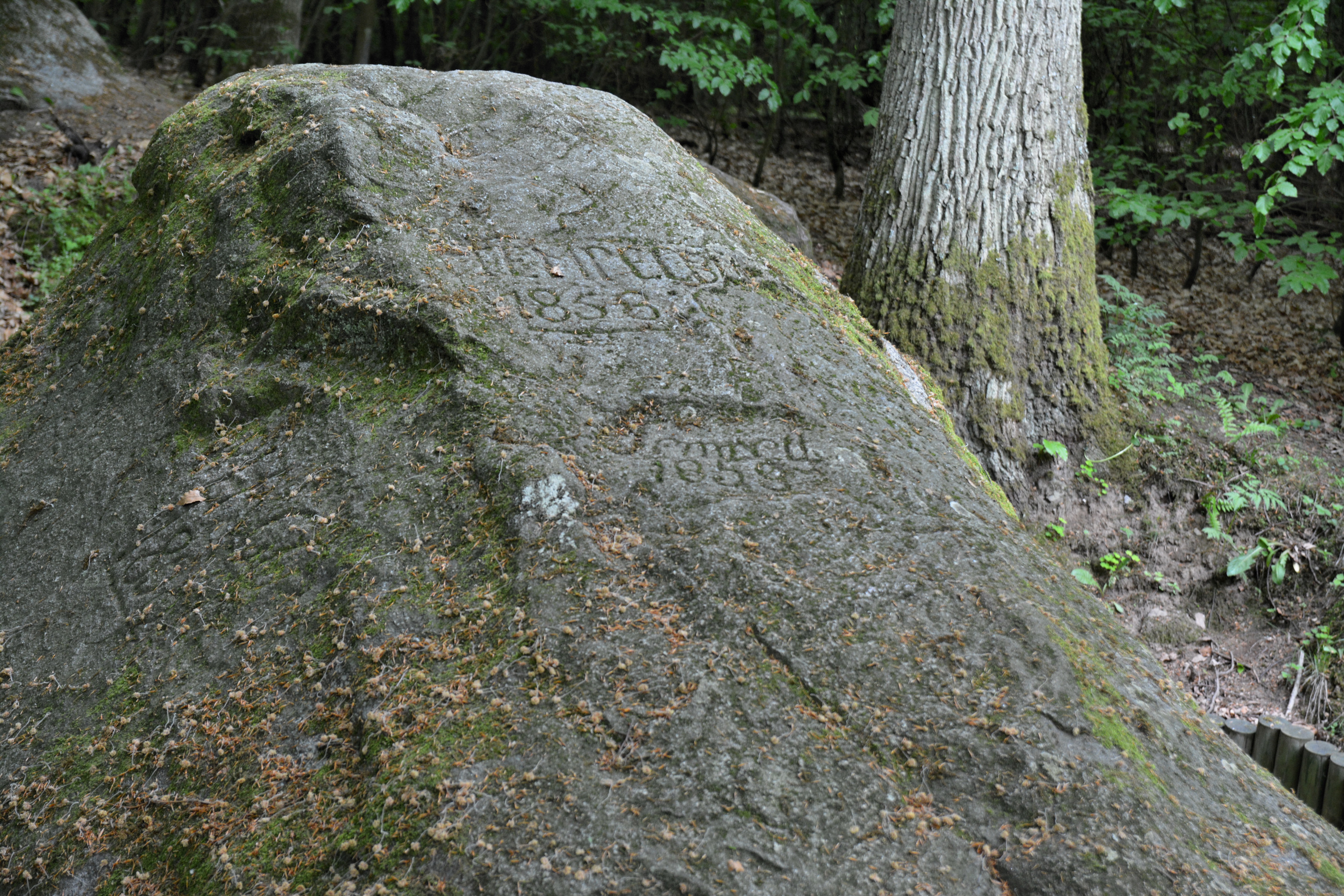 Głaz Tempelburg koło Czaplinka